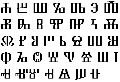 Oglata glagolica. Izdelal Marino PavletiÄ .